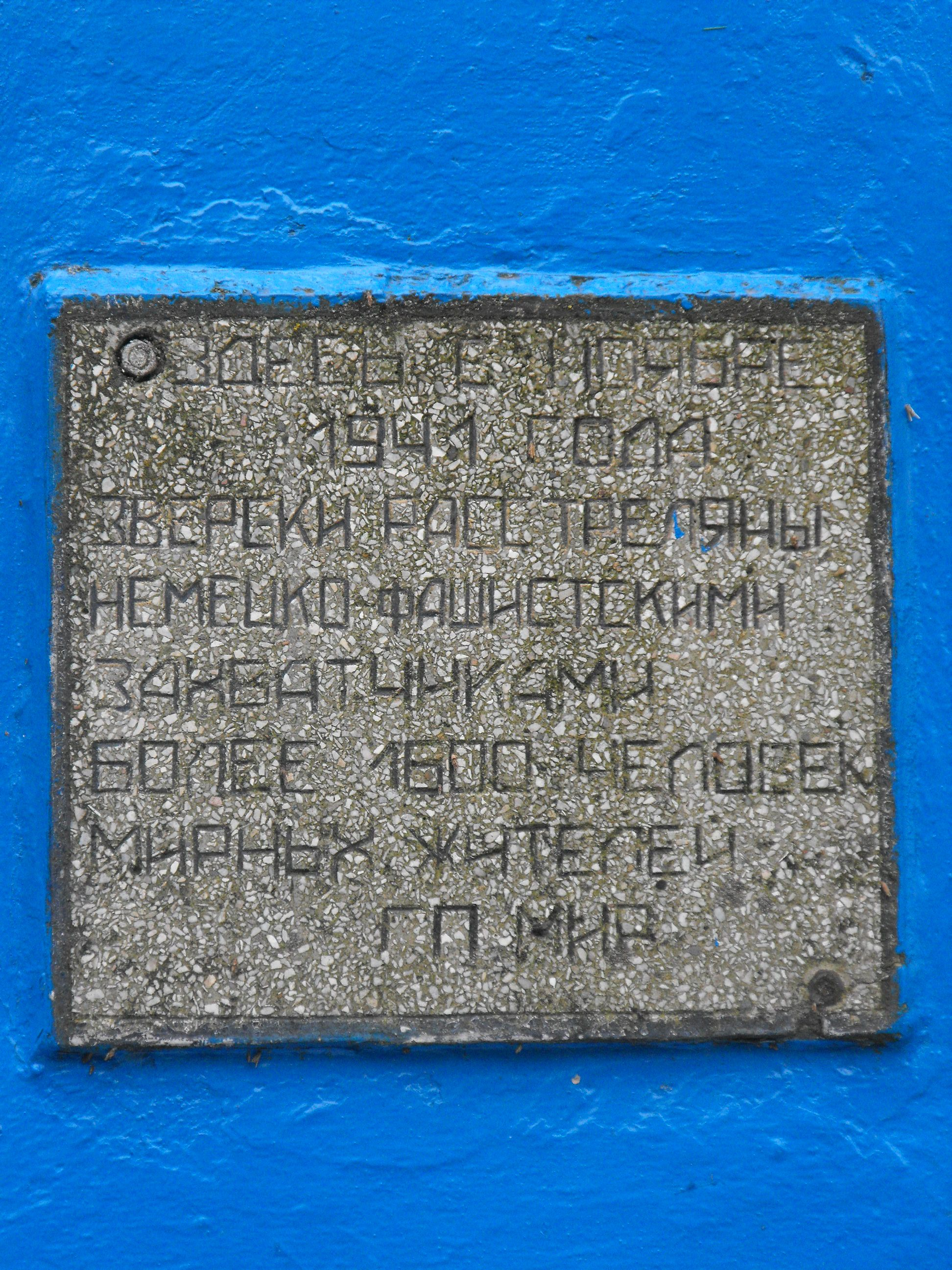 Мемориал на месте убийства нацистами 9 ноября 1941 года около 1600 евреев местечка Мир. Находится на улице Танкистов возле здания № 42 — ПТУ № 234. Установлен в 1966 году.